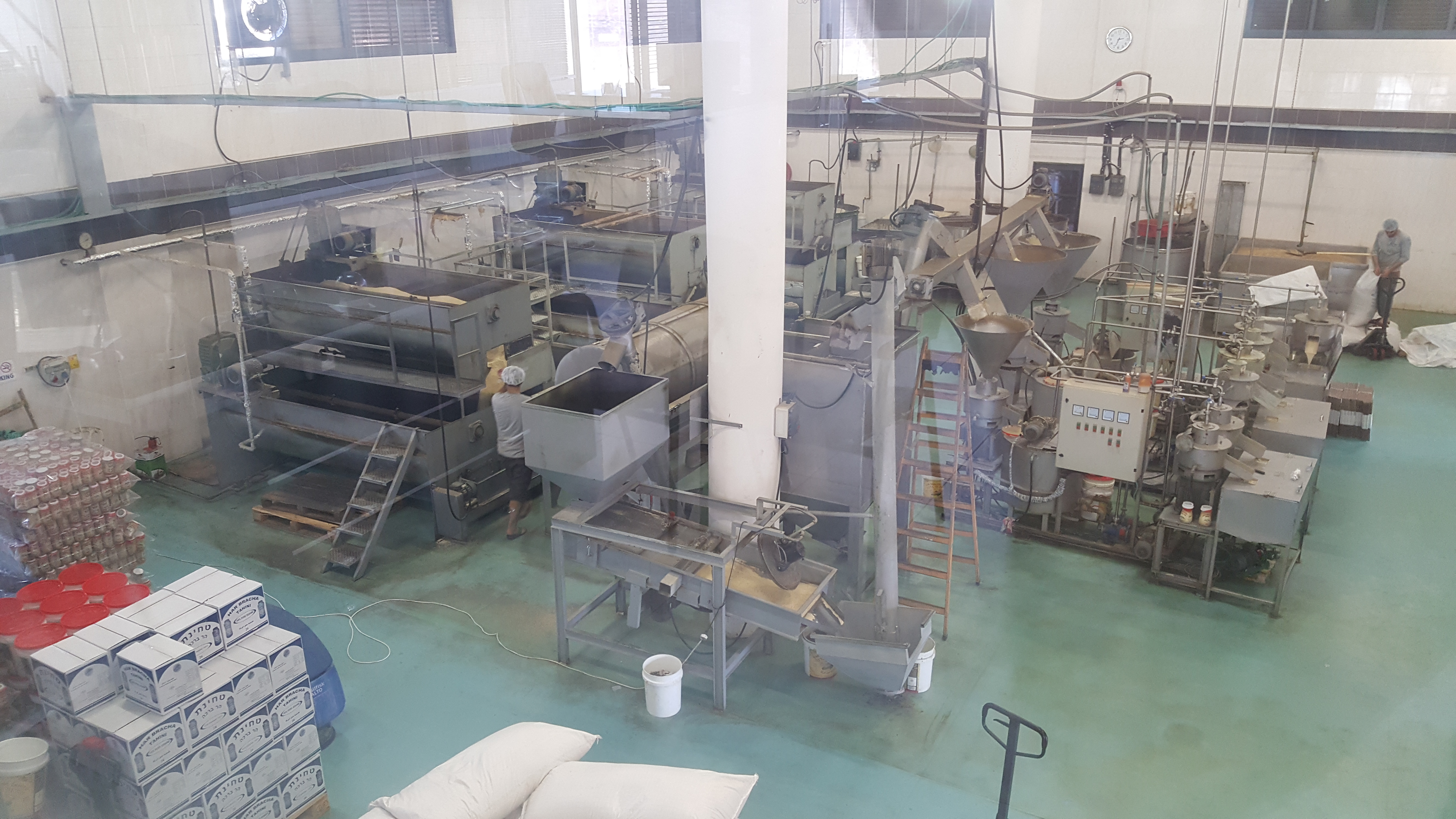 מפעל טחינה - השומרונים בהר גריזים